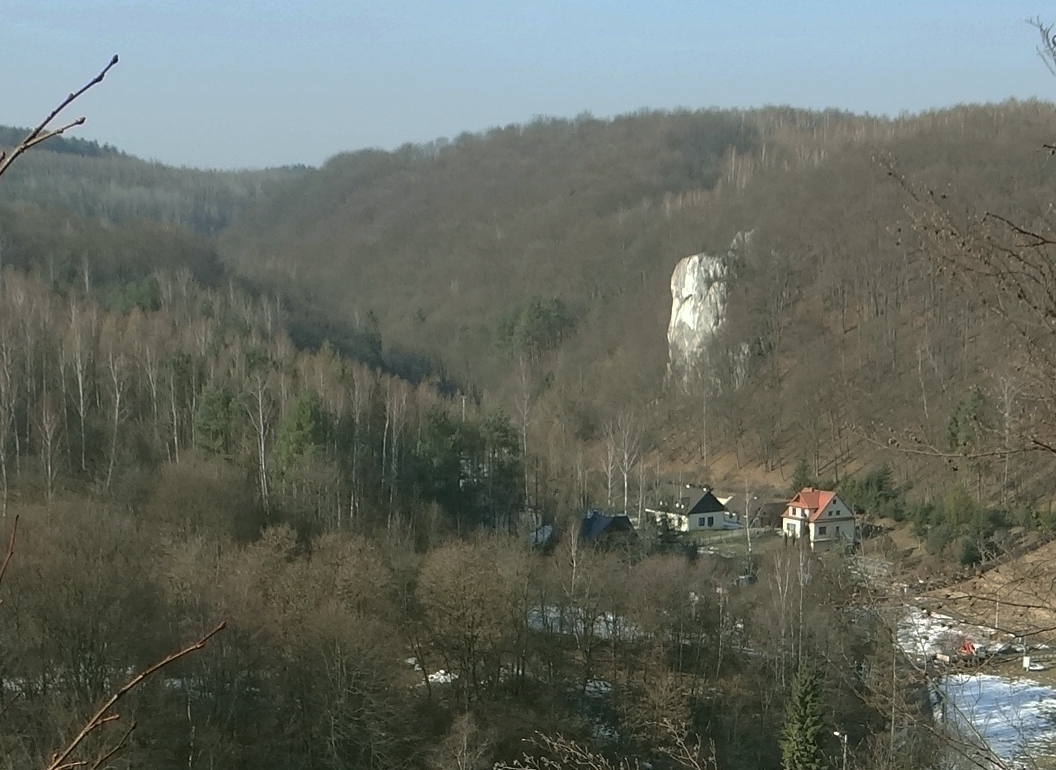 Wąwóz Przecówki w Dolinie Będkowskiej